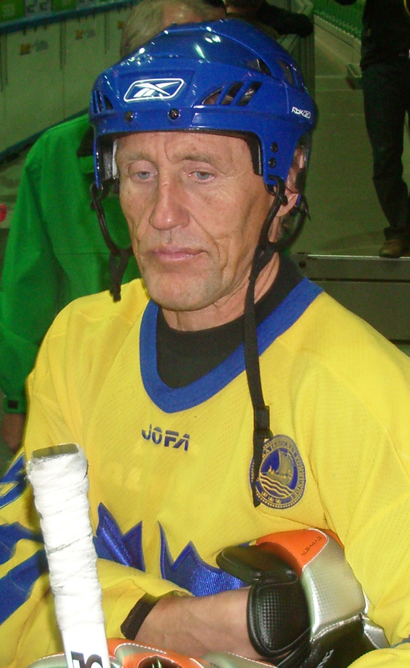 En bild på Börje Salming under OldStar-matchen i Scandinavium, april 2007.